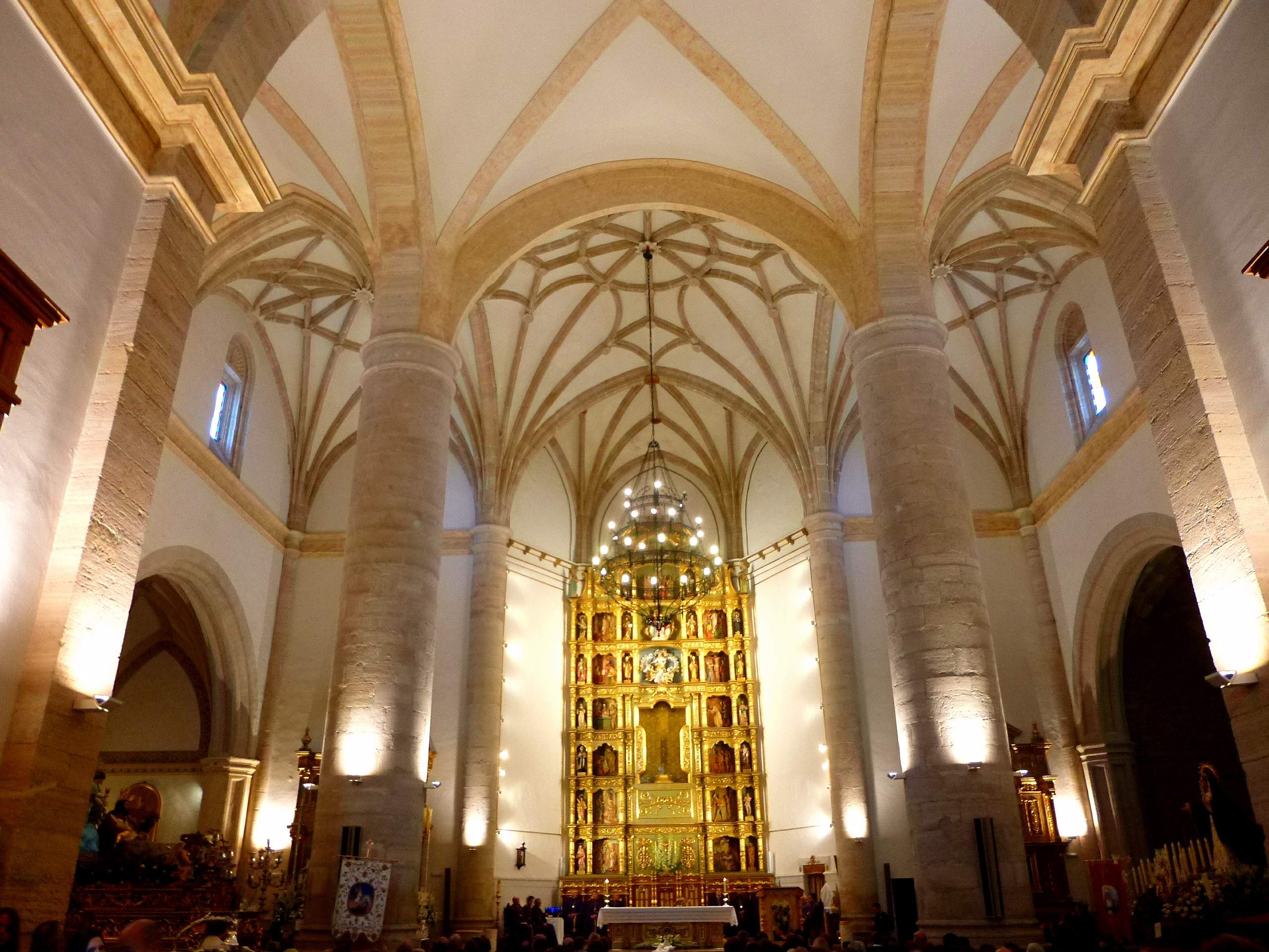 Iglesia de Nuestra Señora de la Asunción (Socuéllamos, Ciudad Real)